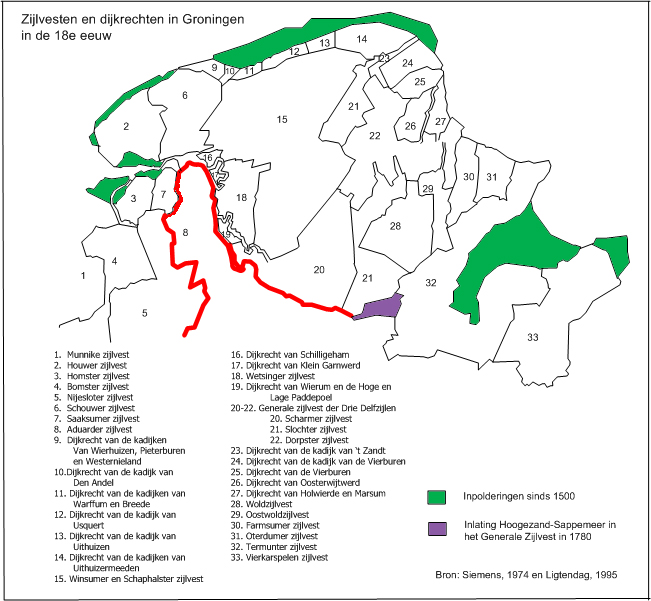 Kaart met de omvang van zijlvesten en dijkrechten in de provincie Groningen omstreeks 1750. De kaart is door mij getekend naar de kaarten aanwezig bij Siemens (1974) en Ligtendag (1995)